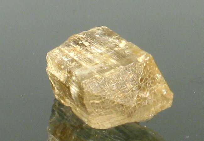 skapolit, pochodzenie Madagaskar, Benono; autor zdjęcia Stowarzyszenie Spirifer